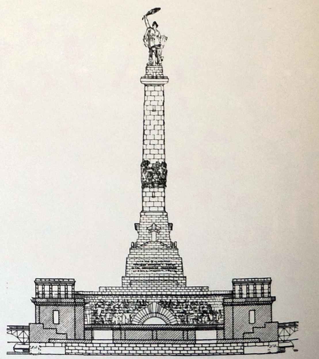 Сооружения на верхней голове верхнего шлюза. Ранний проект Жигулёвского гидроузла